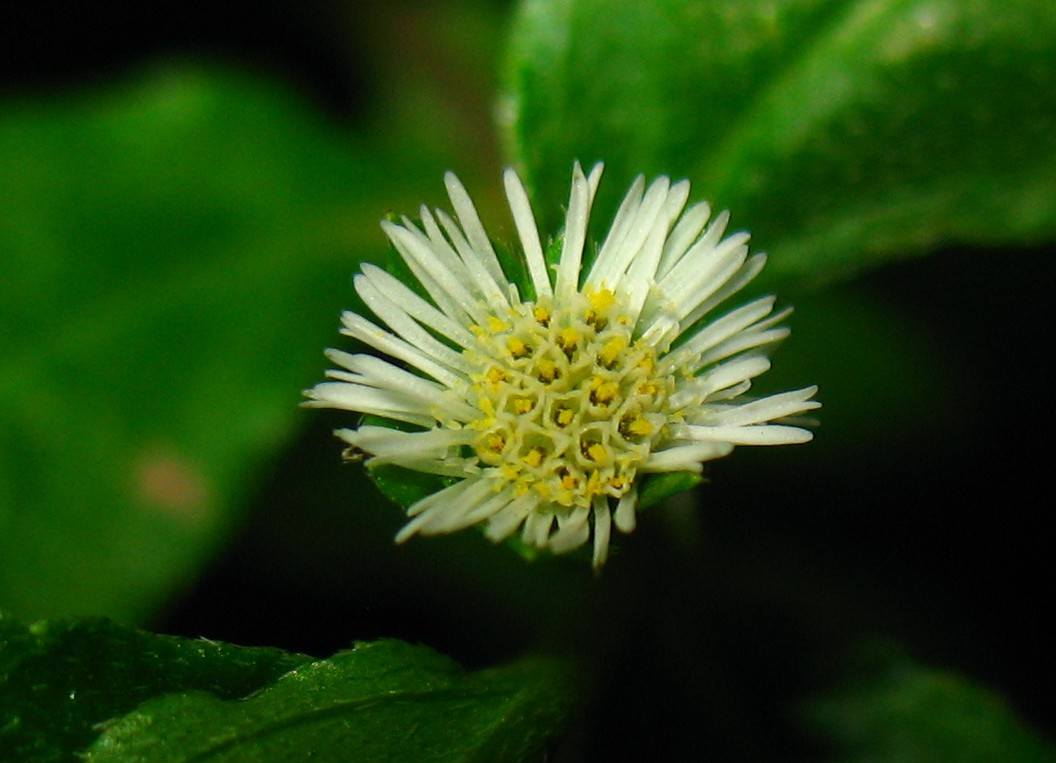 കയ്യോന്നിയുടെ പൂവ്